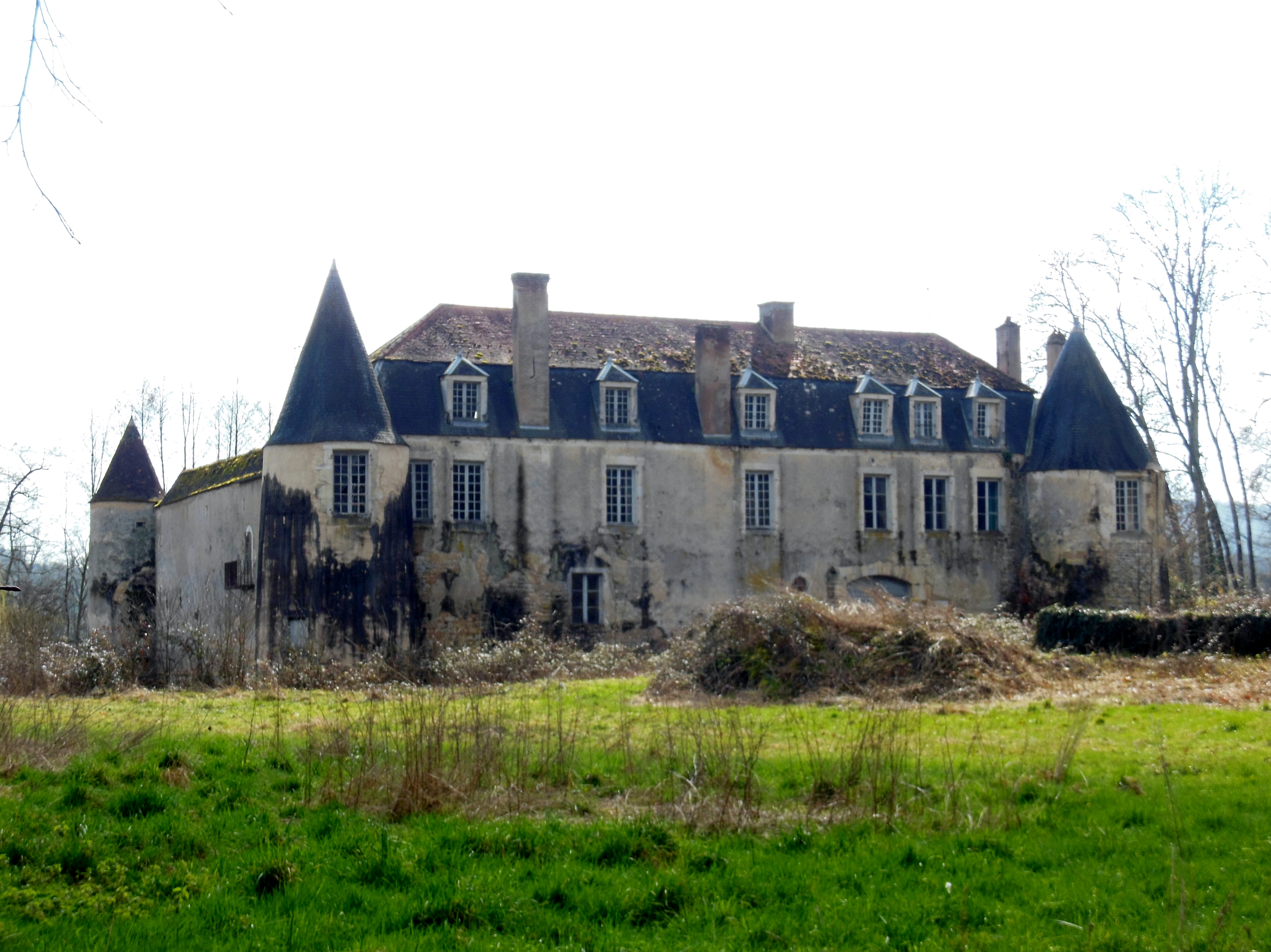 Château du Cro (XVIIe s), à Saint-Moré (Yonne)